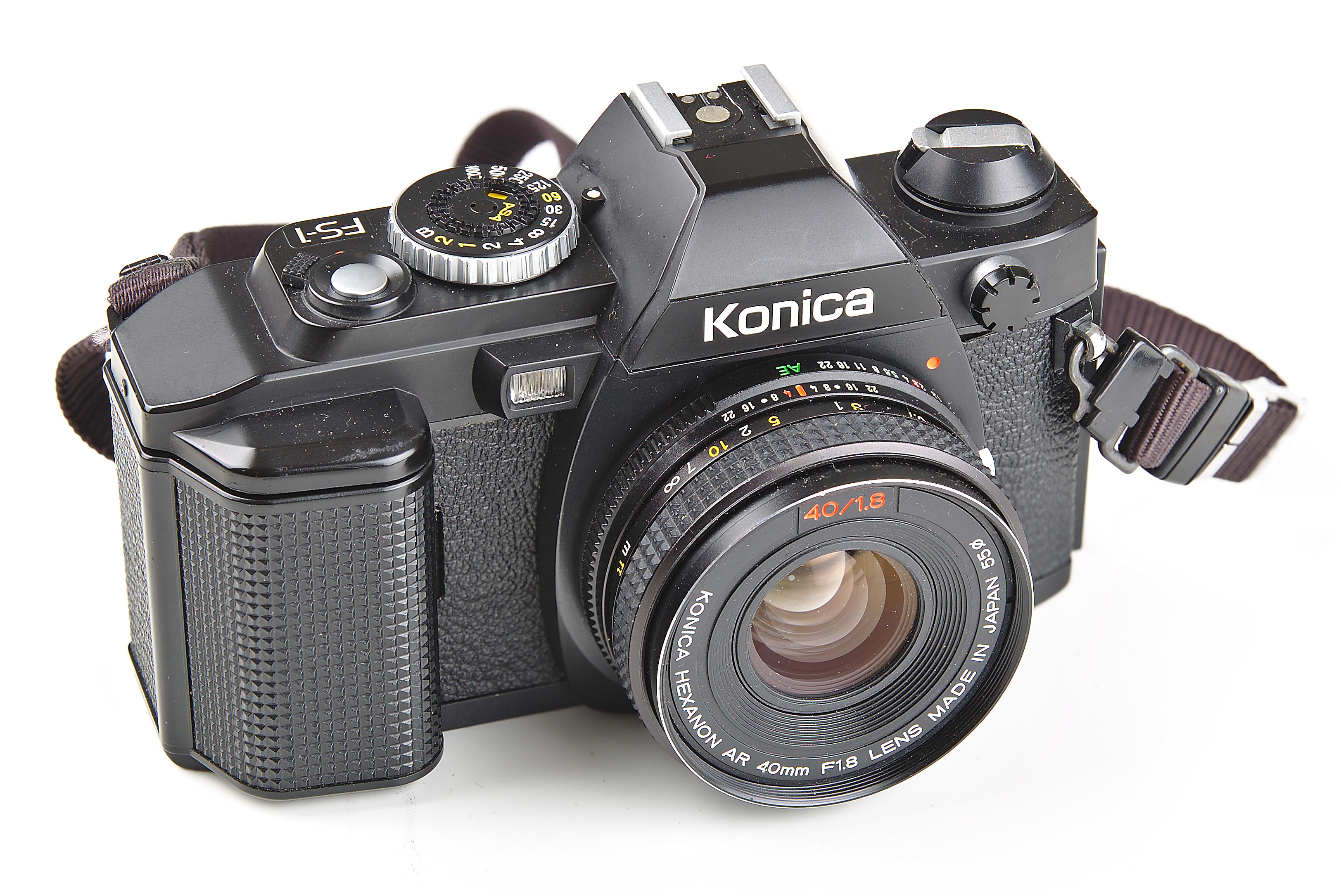 Konica FS-1 mit Konica Hexanon 40mm f/1.8 stacked